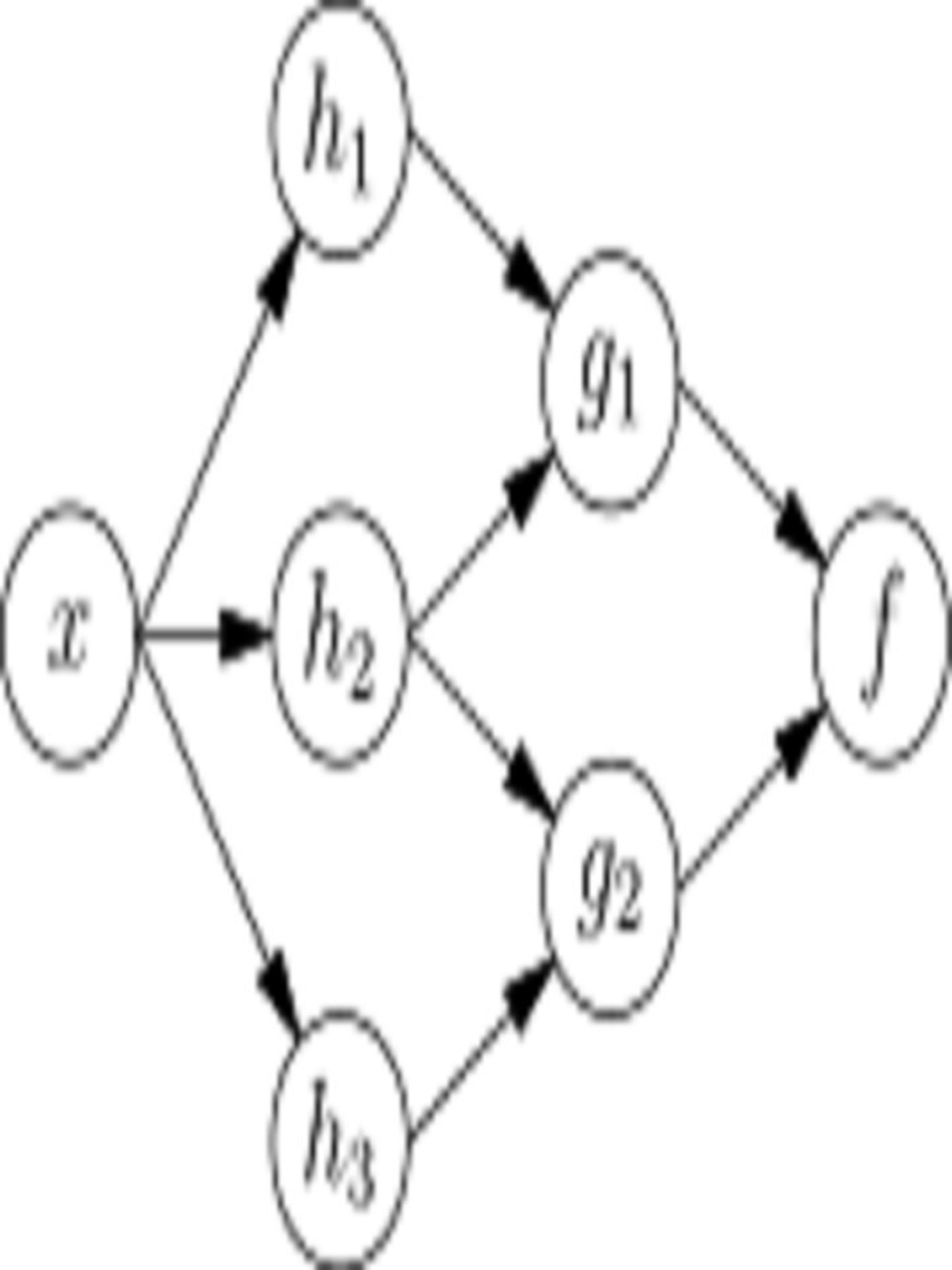 Grafo de Dependencia Ann edit_2017.jpg